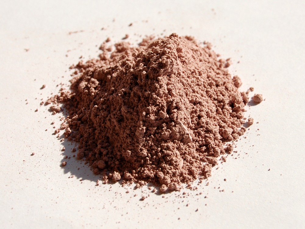 Basic cobalt(II) carbonate